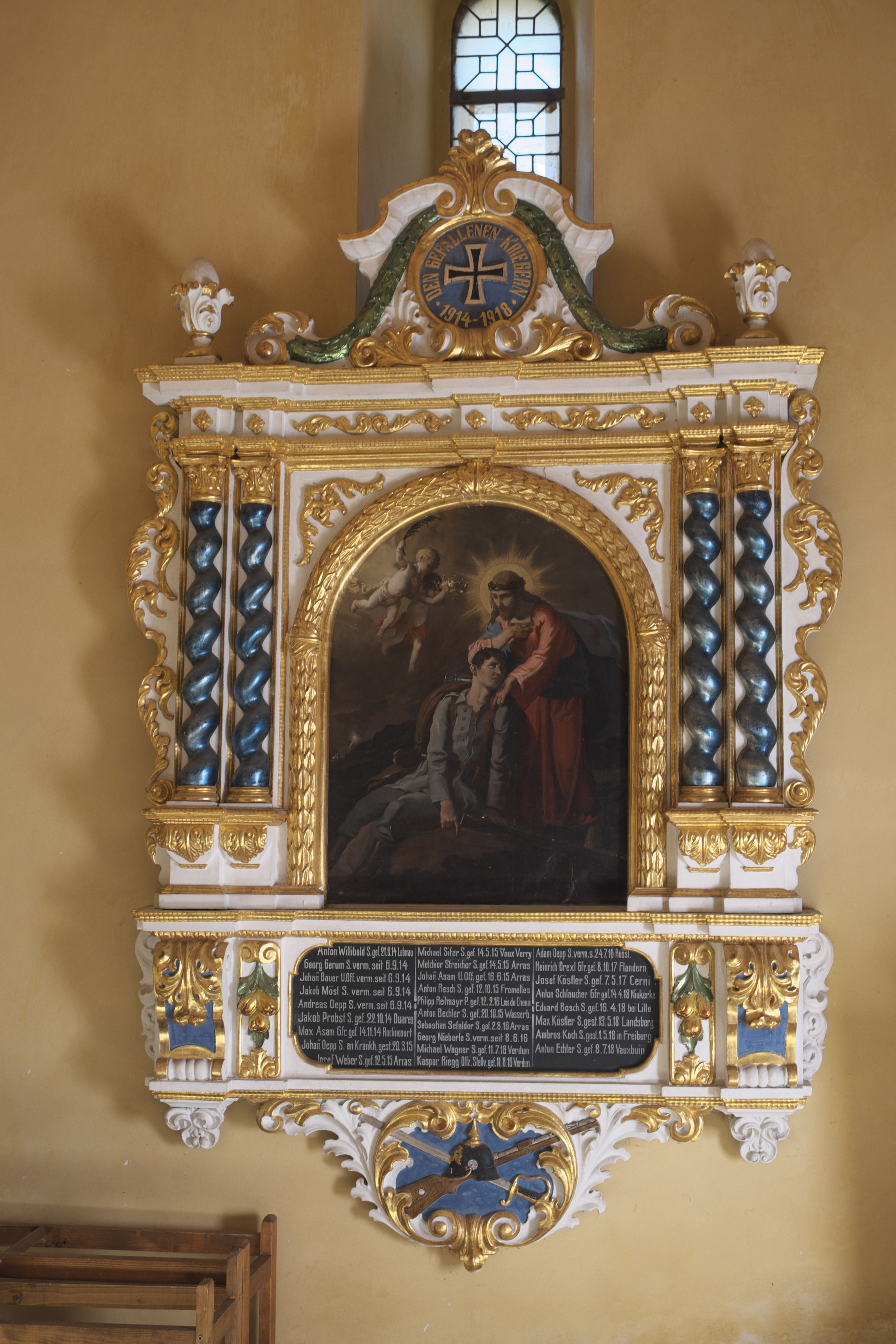 Katholische Pfarrkirche St. Michael in Hofstetten im oberbayerischen Landkreis Landsberg am Lech (Bayern/Deutschland), Kriegerdenkmal